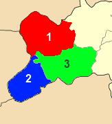 Χάρτης των ενοτήτων (και πρώην δήμων) από τις οποίες αποτελείται ο Δήμος Αργιθέας